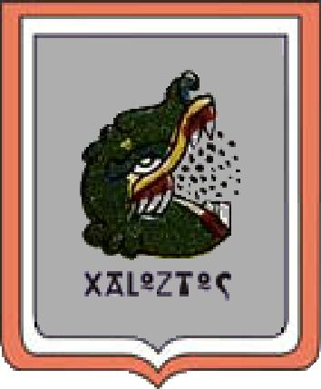 GLIFO U ESCUDO DE XALOZTOC